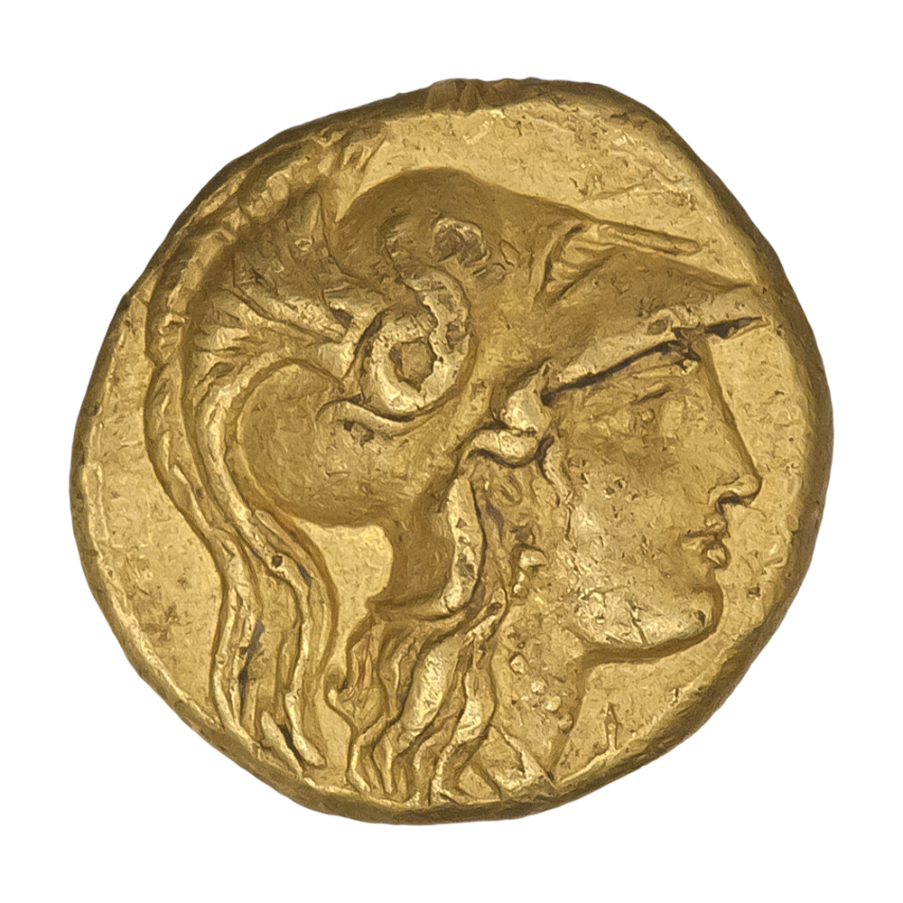 Македонское царство. Сарды. Александр III Великий (336—323 гг. до н.э.). Прижизненная чеканка. ¼ статера. Ок. 334—323 гг. до н.э. Аверс. Голова Афины в коринфском шлеме, вправо.